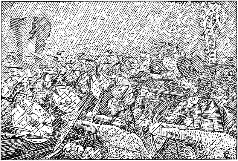 Halfdan Egedius: Illustration for Olav Trygvasons saga. Snorre 1899-edition. «Uveiret under Slaget i Hjårungavaag.» nb: «Uværet under slaget i Hjørungavåg.» nn: «Haglskura under slaget i Hjørungavåg.»